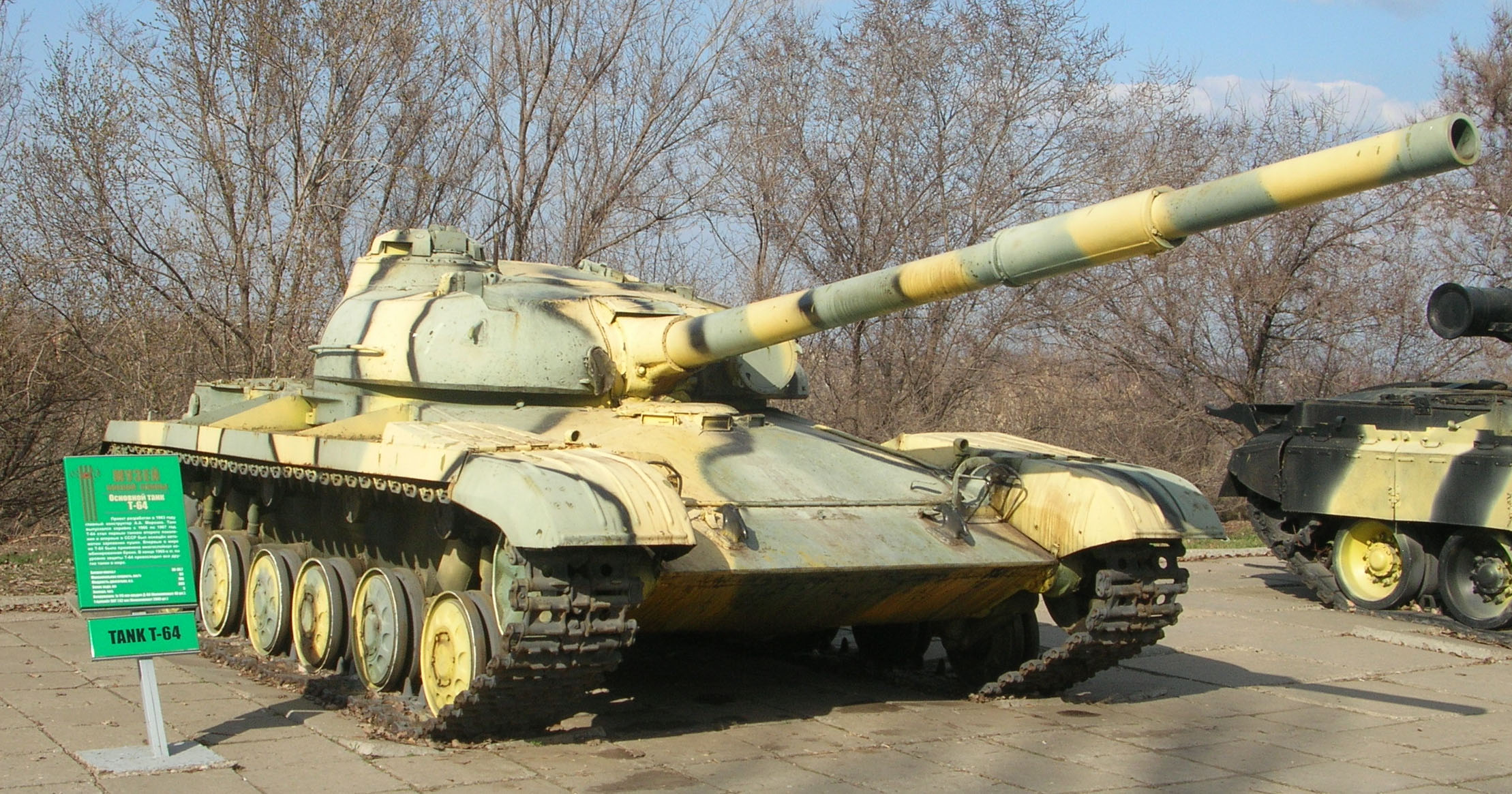 Танк Т-64. Саратовский государственный музей боевой славы. Парк Победы, г. Саратов.